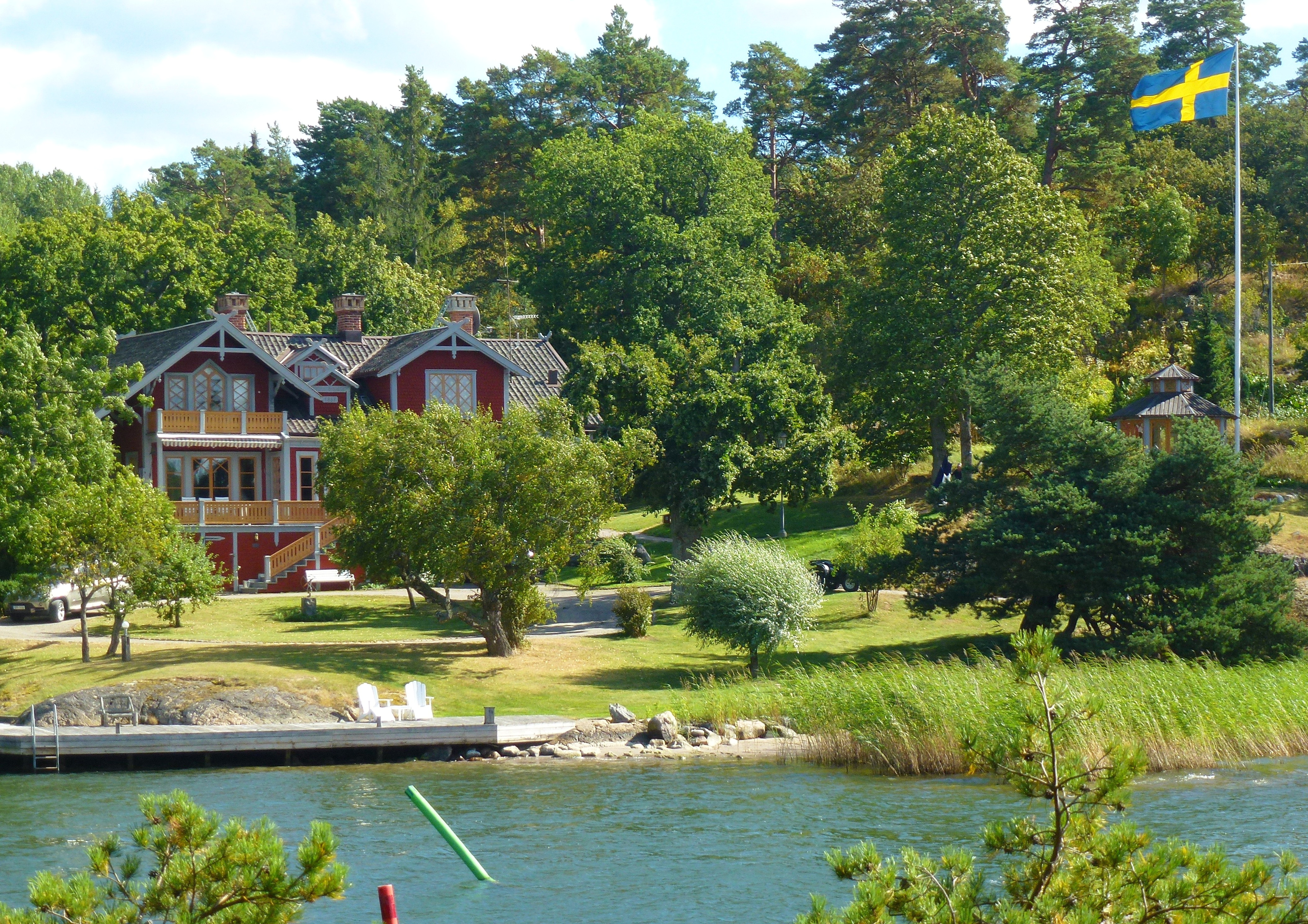 Villa Bråvalla vid Farstafjärden, Värmdö kommun